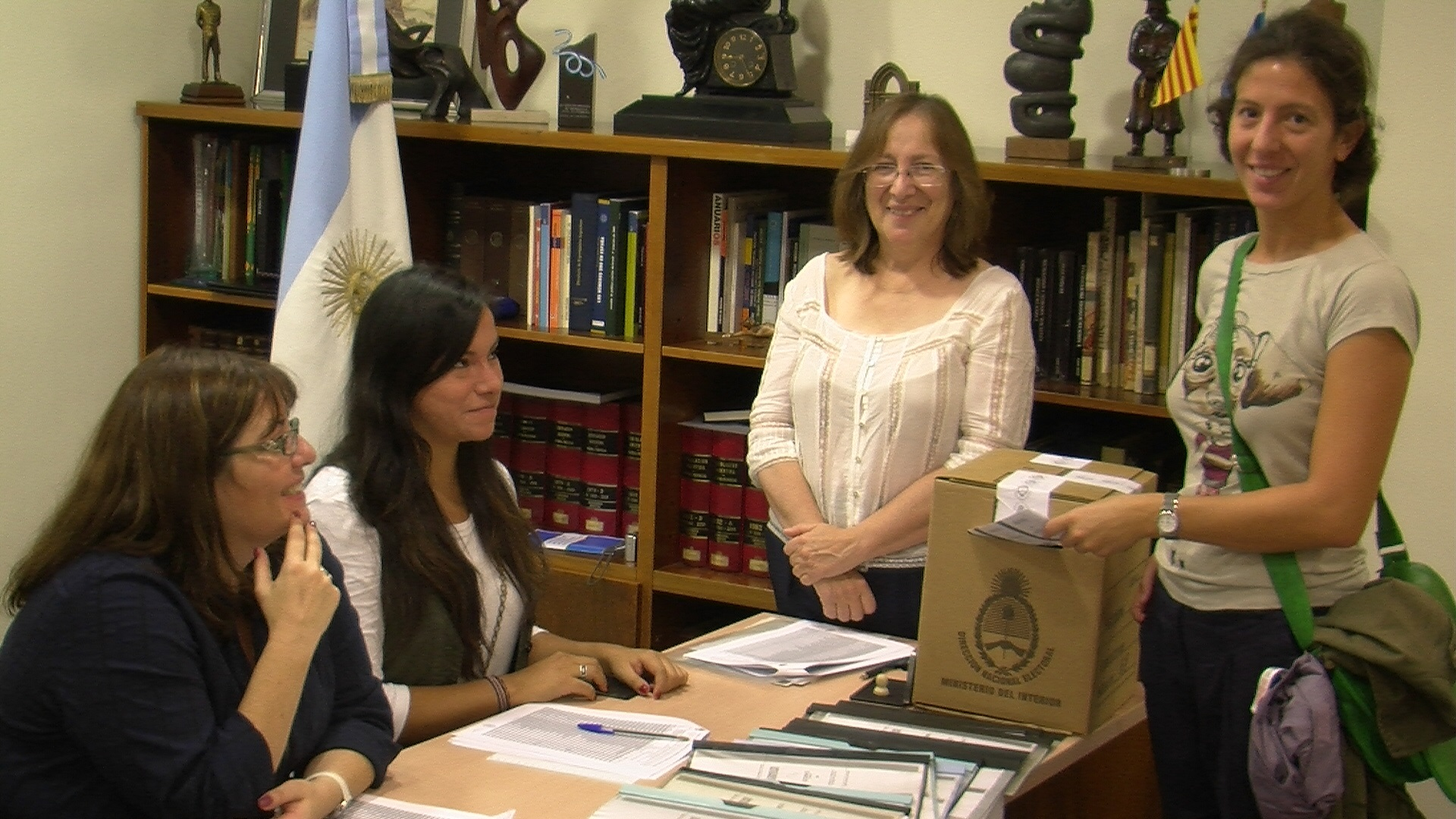 Barcelona, Votaron en el Consulado 982 compatriotas y en estos momentos se realiza el escrutinio. La sede de diplomática nacional está situada en el centro de la ciudad, a sólo cuatro cuadras de importantes obras arquitectónicas del arquitecto Antonio Gaudí y a sólo unos pasos de la plaza Catalunya emblema de esta ciudad.